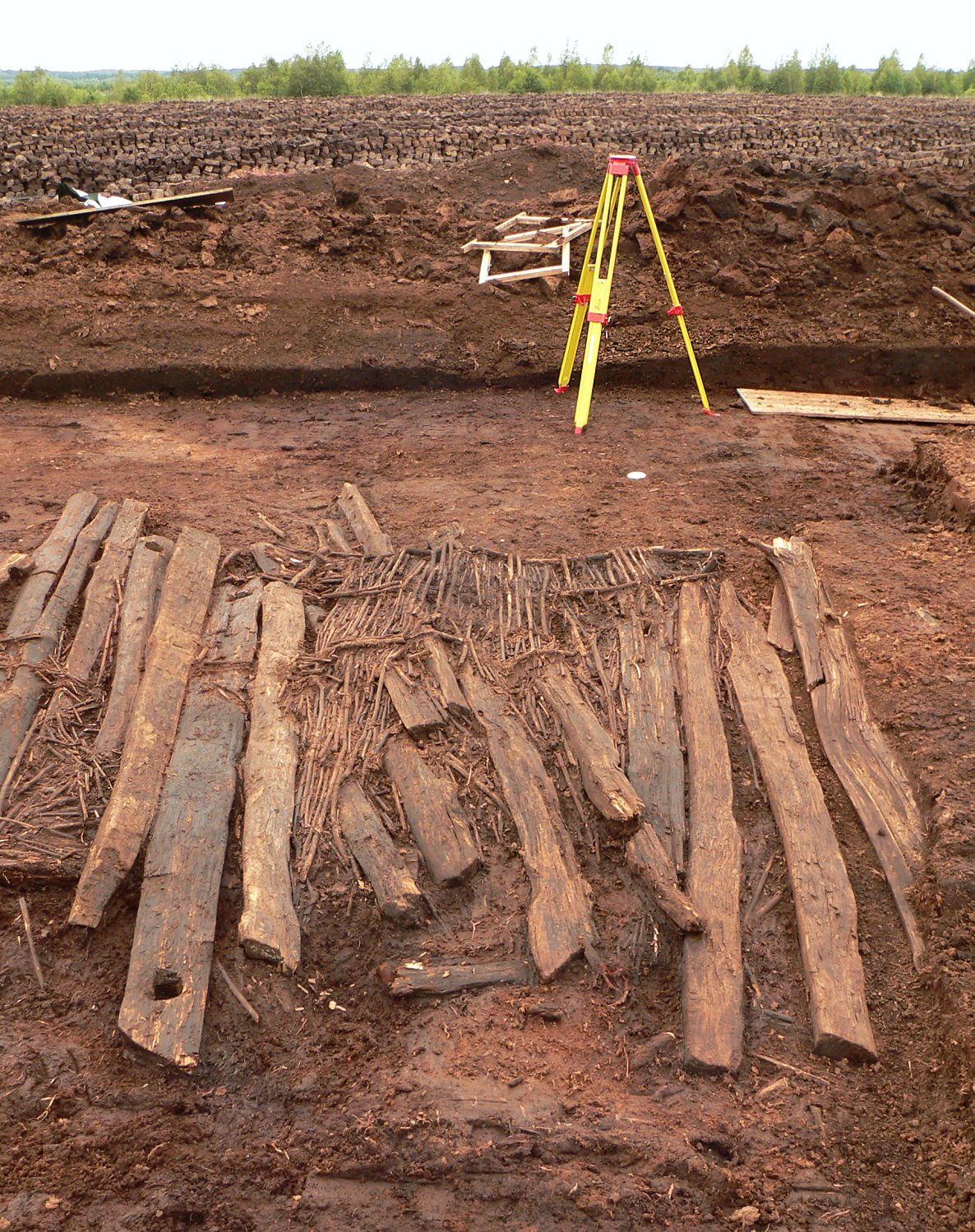 Ausgrabung des Moorweges im Aschener Moor